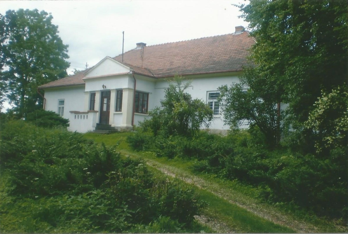 Dworek w Wokowicach